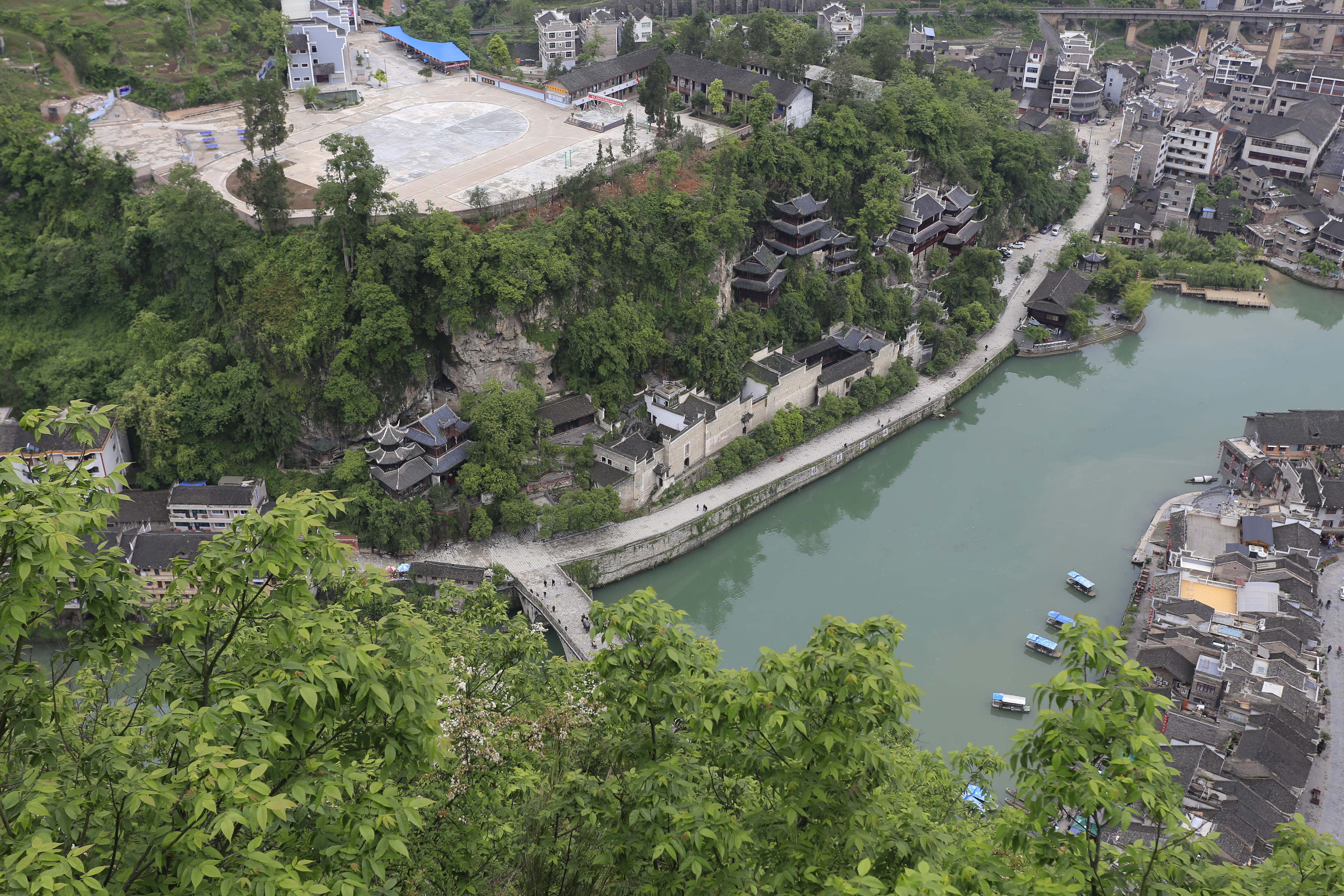 镇远青龙洞—— 高处俯瞰全景